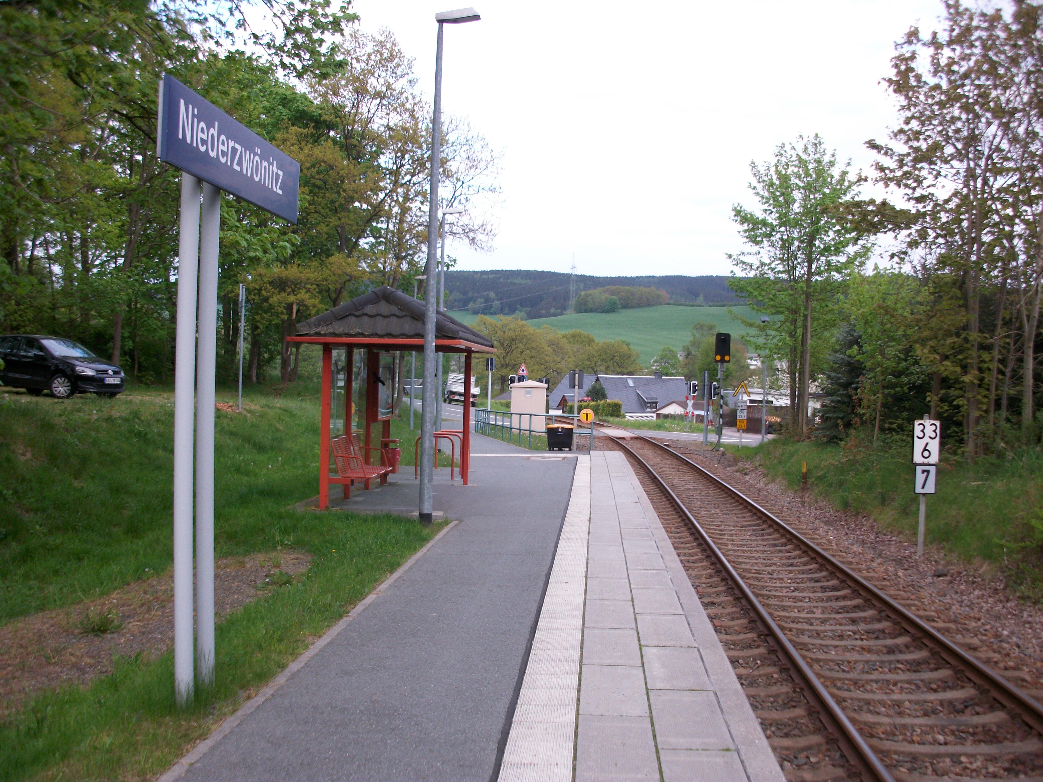 Haltepunkt Niederzwönitz (2016)